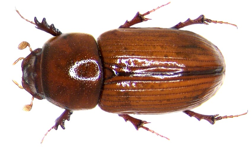 Familie: Scarabaeidae Grösse: 4,5-6 mm Fundort: Marokko, Marrakech leg. det. U.Schmidt, 1995 Foto: U.Schmidt, 2006